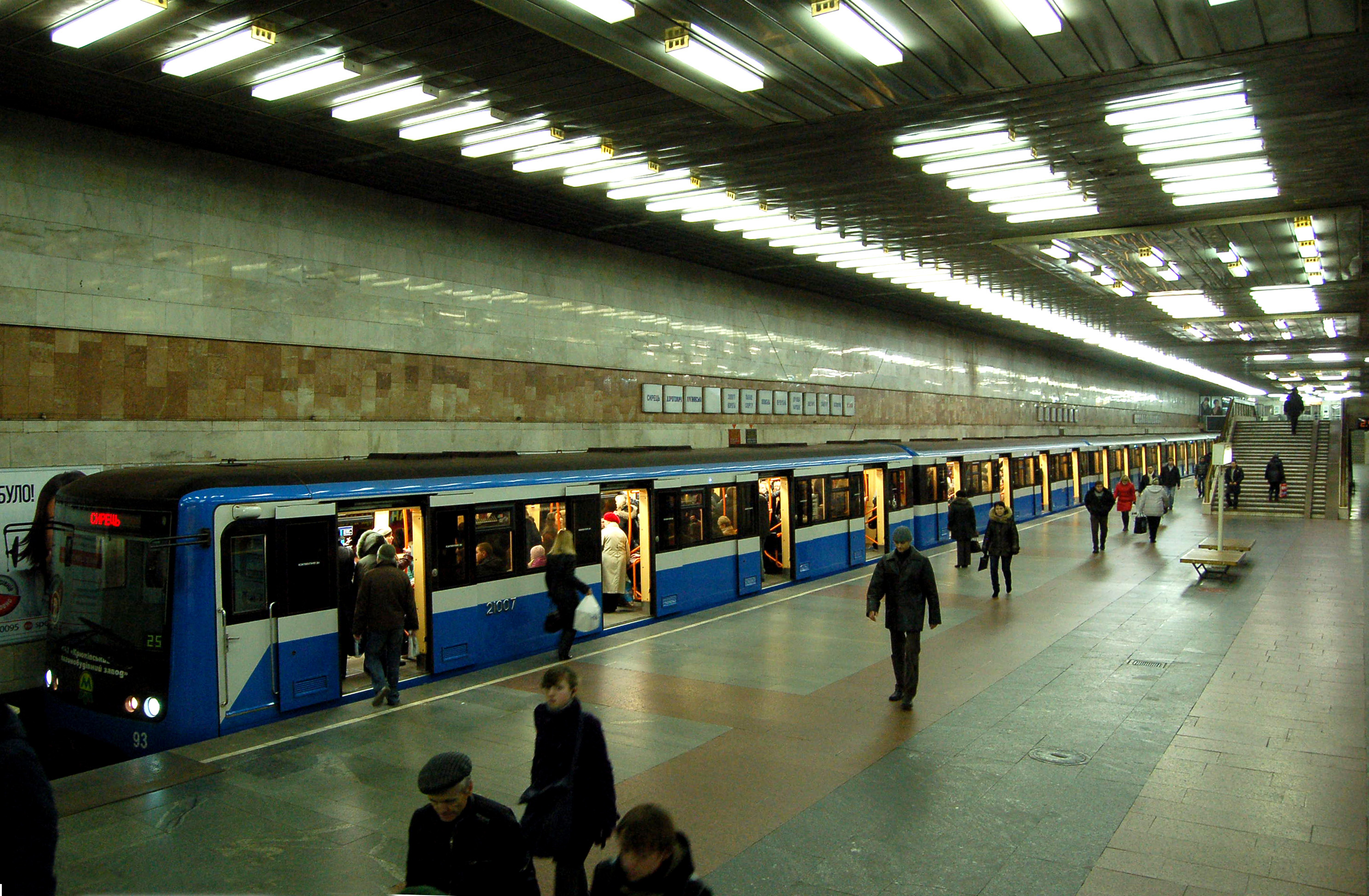 Cтанция метро «Позняки», пассажирская платформа